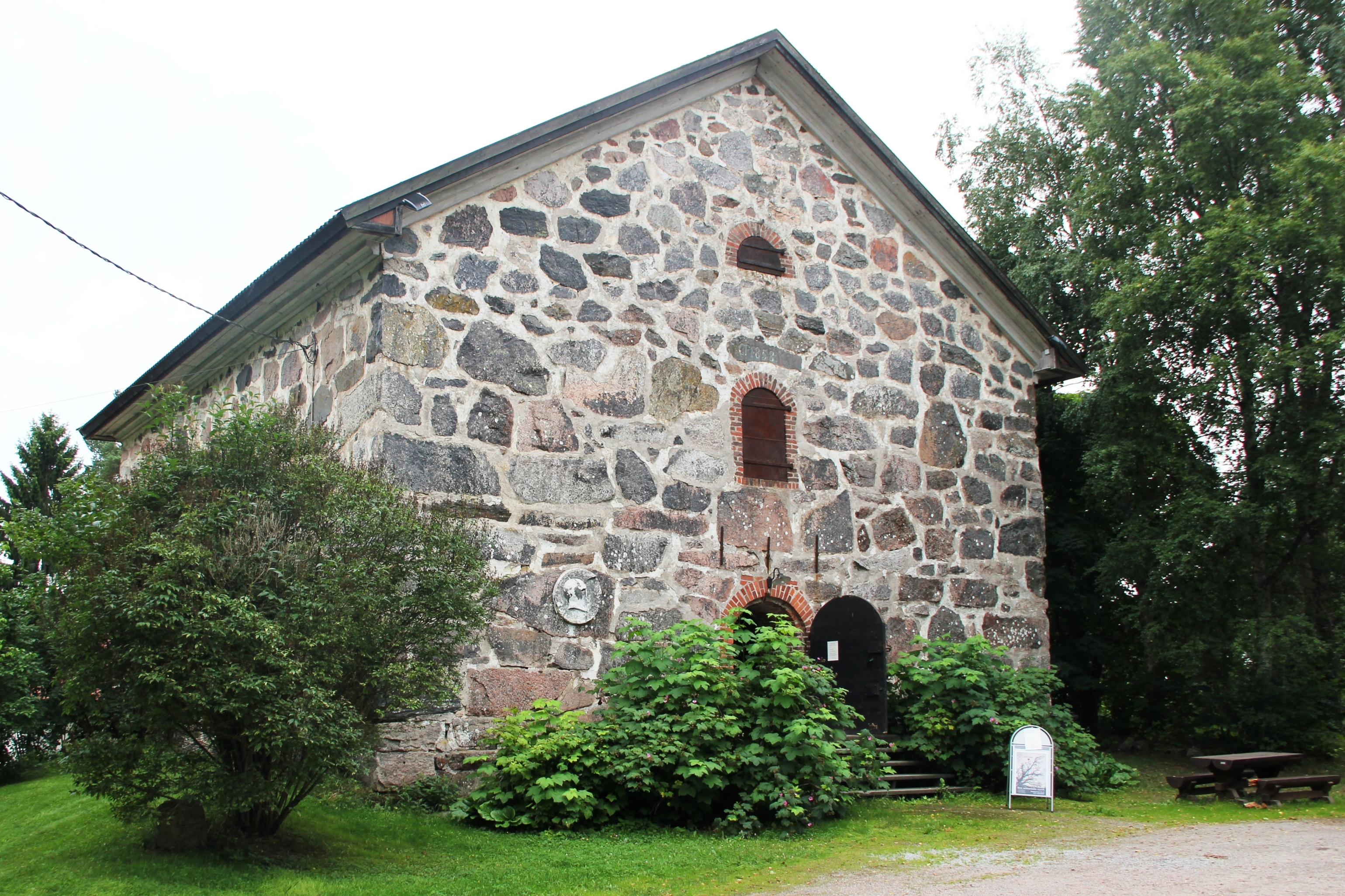 Kiskon Toijan viljamakasiini, valmistunut 1858, käytössä näyttelytilana